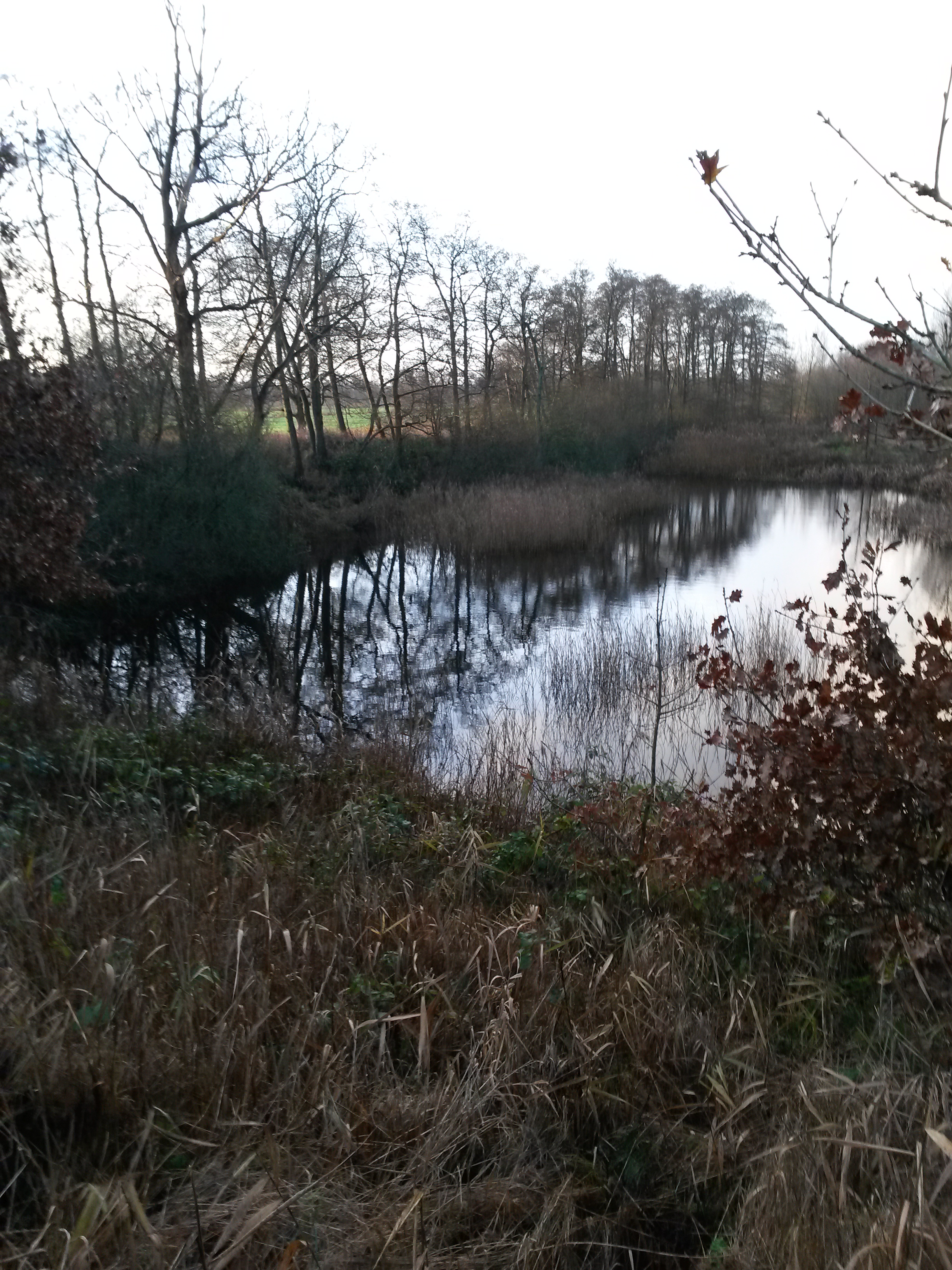 Plaats Hege Bulten, Kootstertille